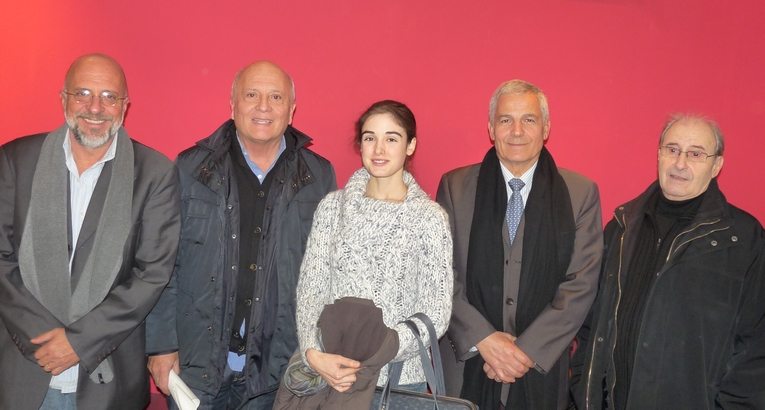 Toute l'équipe du film